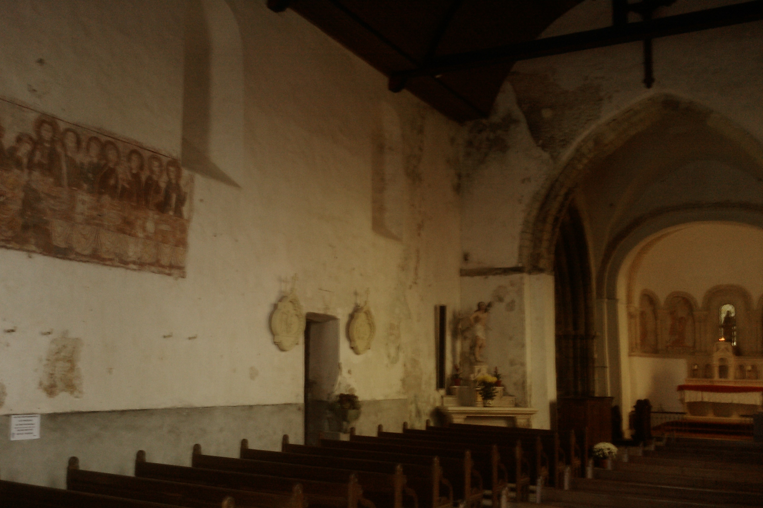 Église Notre-Dame-et-Sainte-Barbe de Savigny